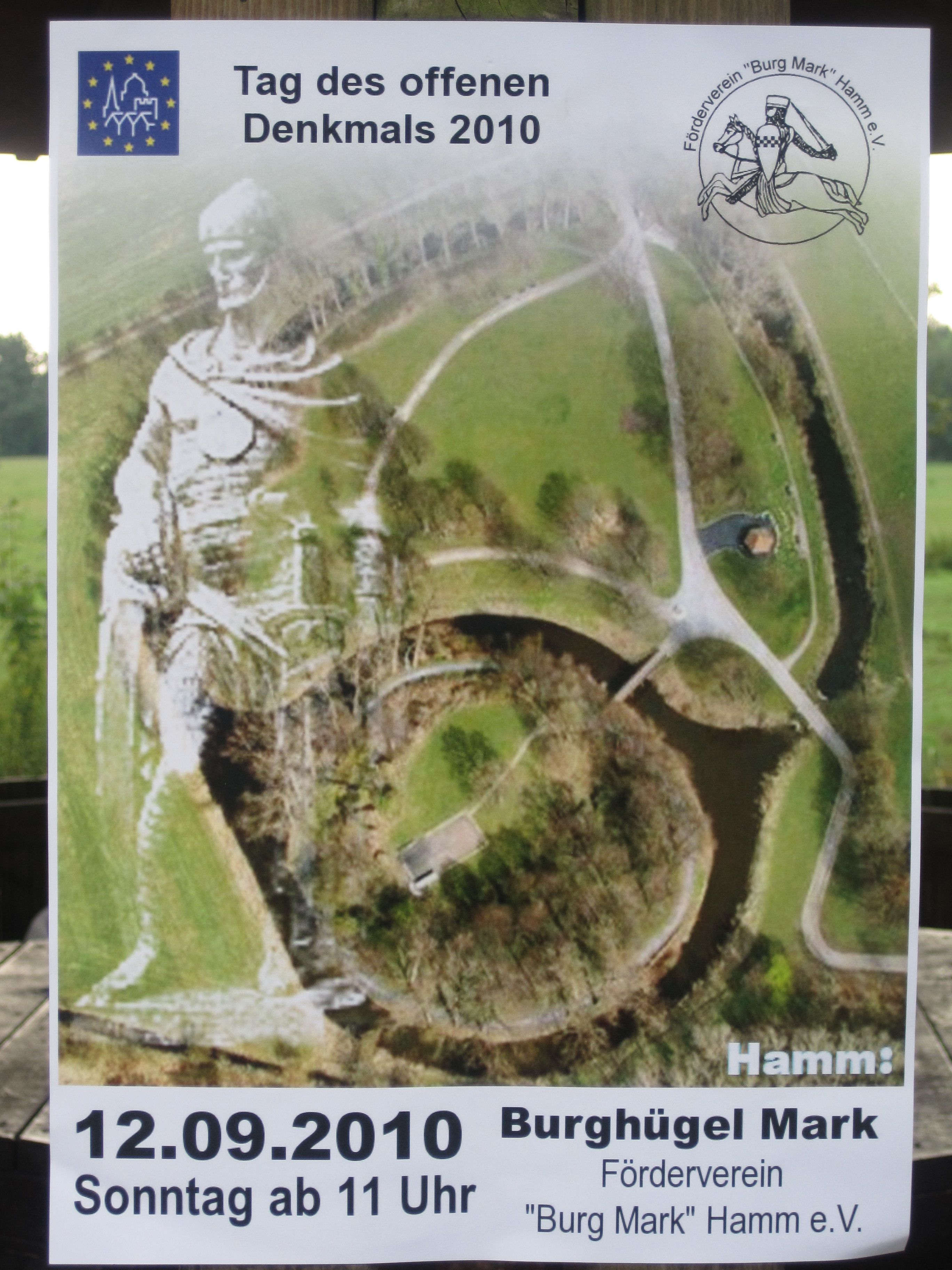 Dieses Foto zeigt eine Informationstafel des Fördervereins "Burg Mark" Hamm e.V. anlässlich des Tages des offenen Denkmals am 12. September 2010.